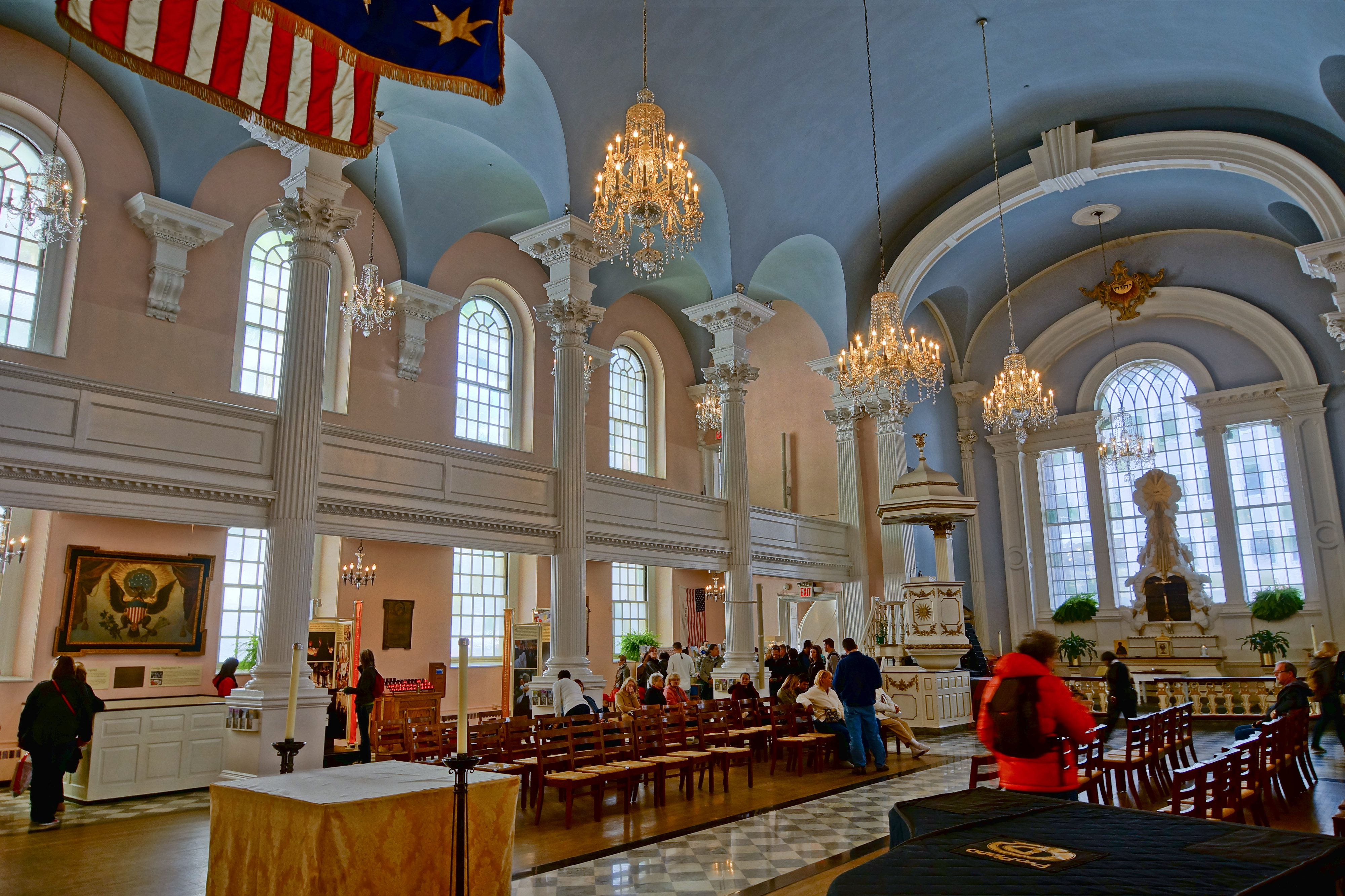 NYC - St Paul Chapel - Interieur